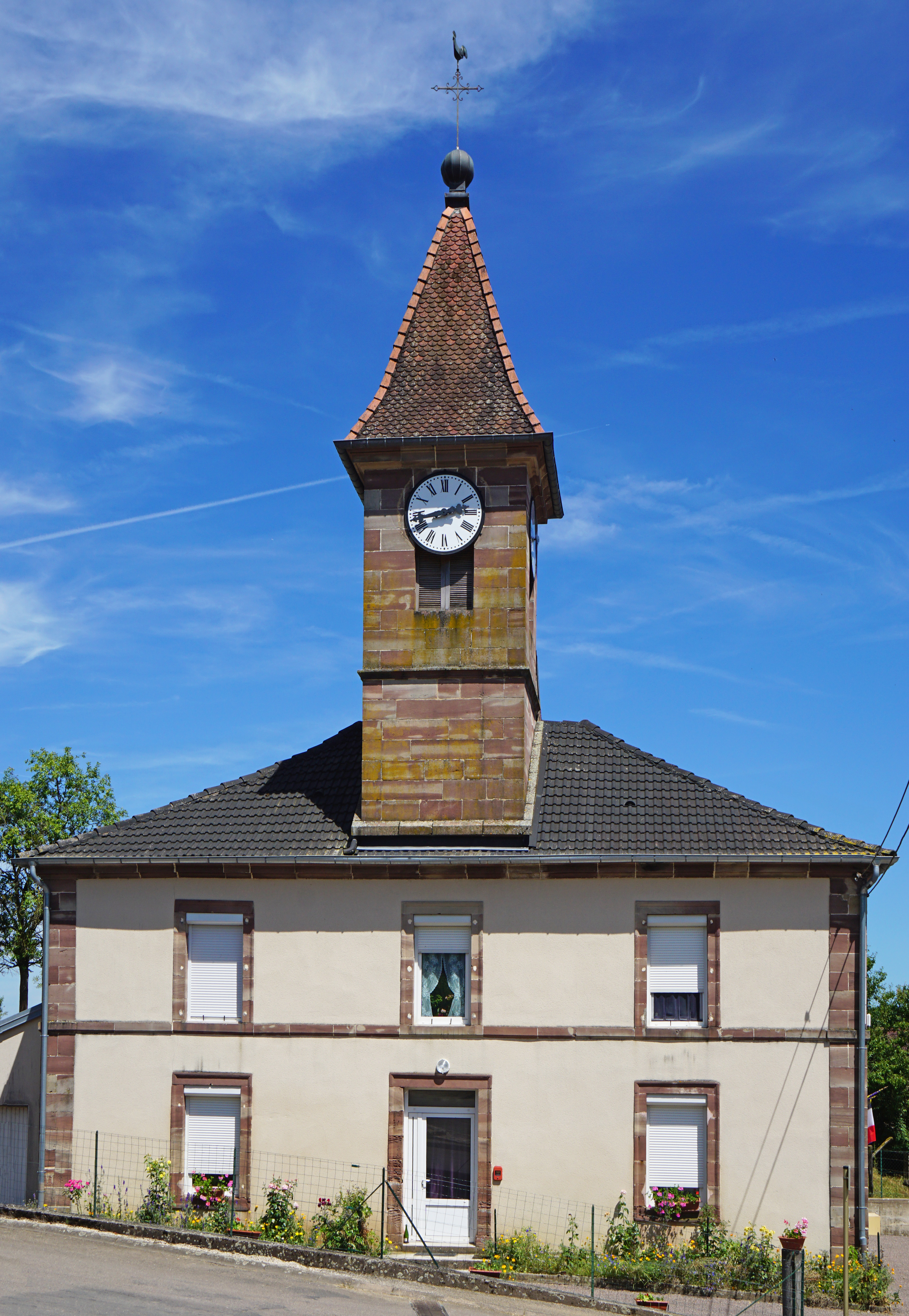 Mairie de Visoncourt.